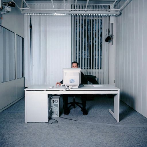 Usability Lab in München. Veröffentlicht in: VDI nachrichten Nr. 47, 24. November 2000, Seite 3: Ich drück’ dich ganz einfach. Usability Lab, Siemens